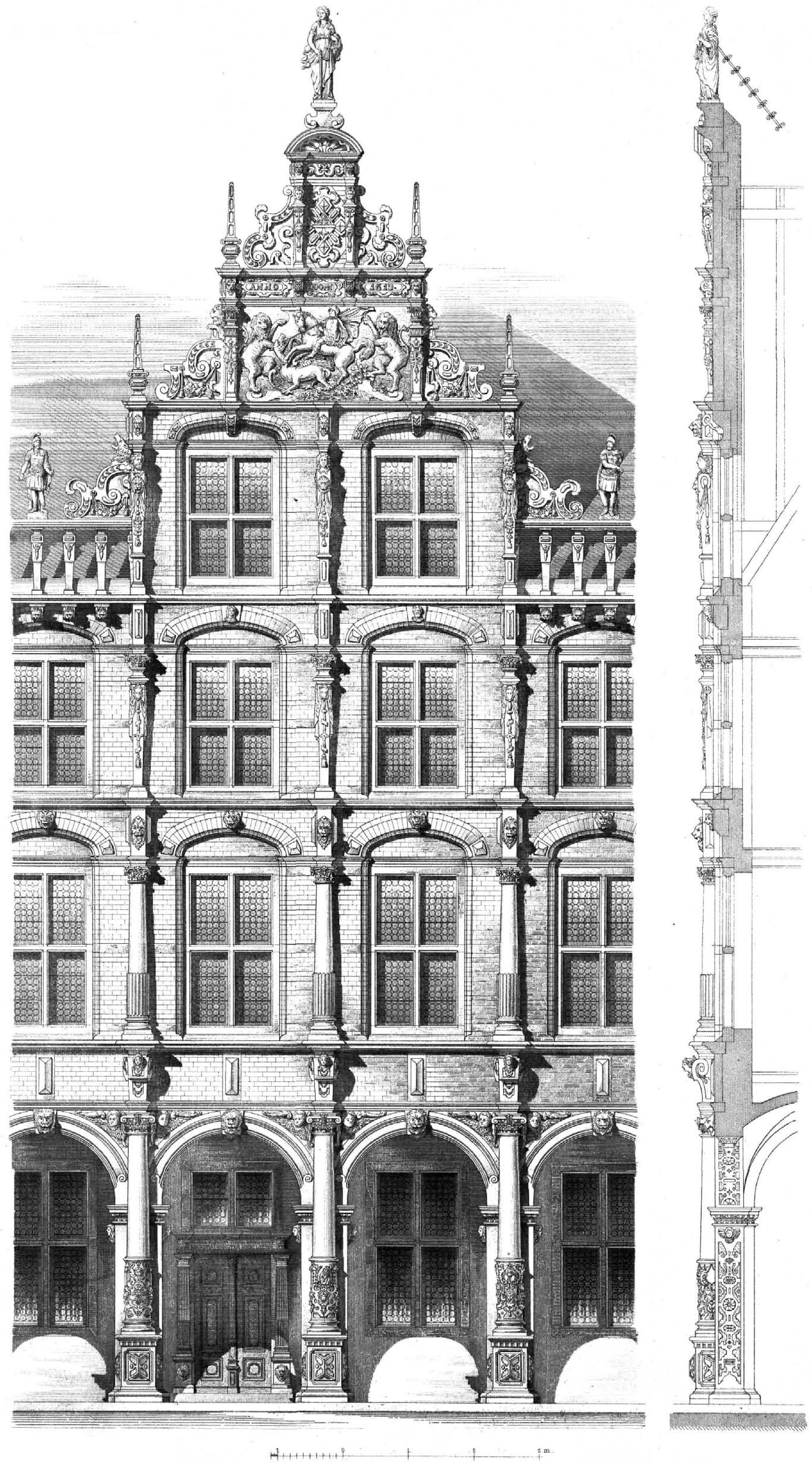 Hauptfront des Rathauses in Bocholt (Kupferstich)